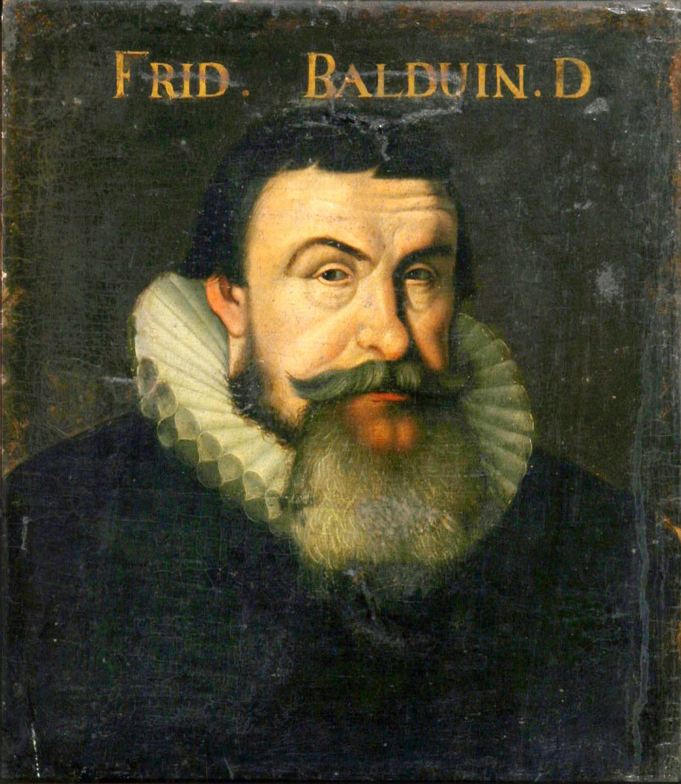 Frid. D. Balduin (1575–1627), Öl auf Leinwand